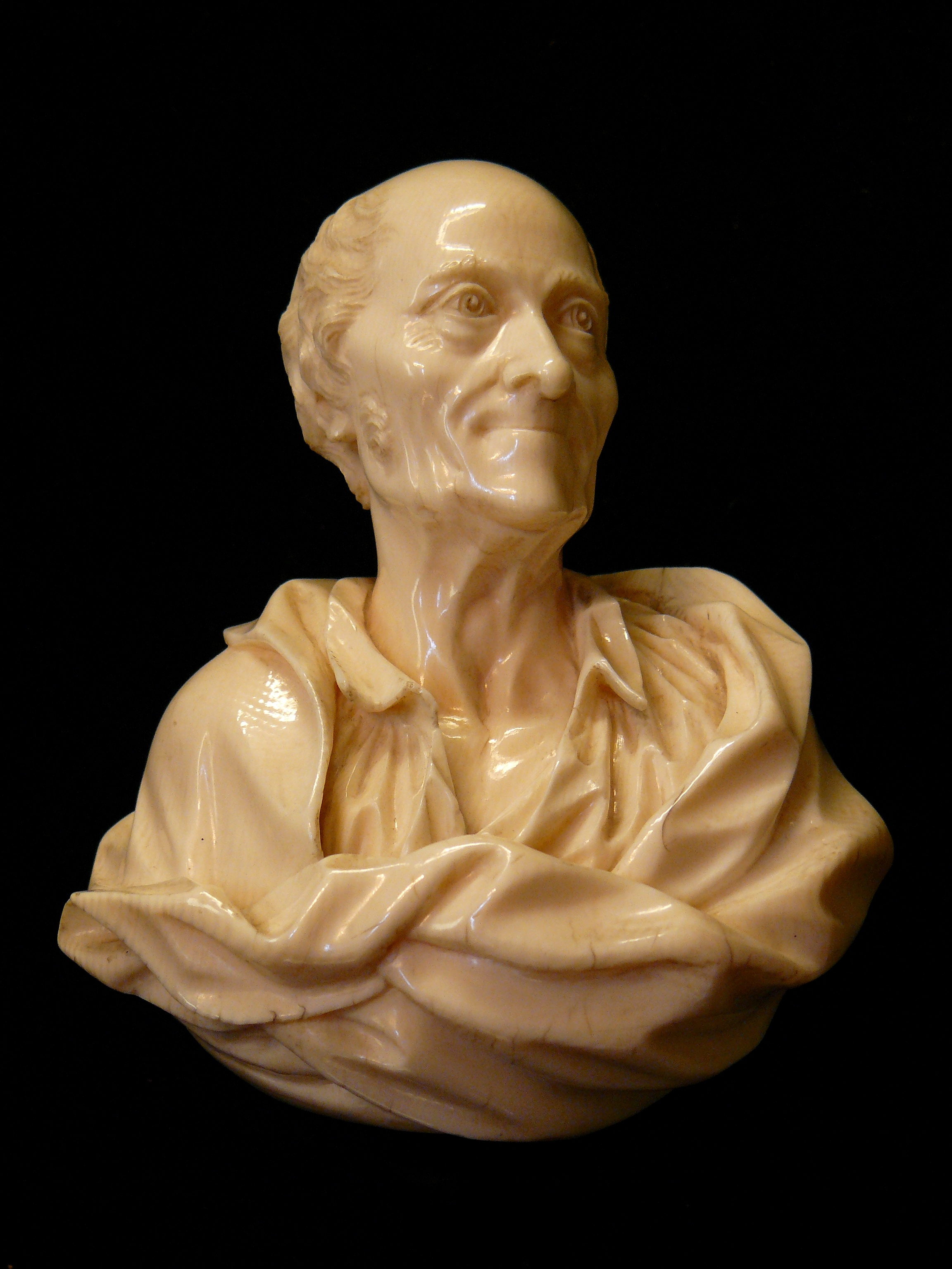 Buste de Voltaire